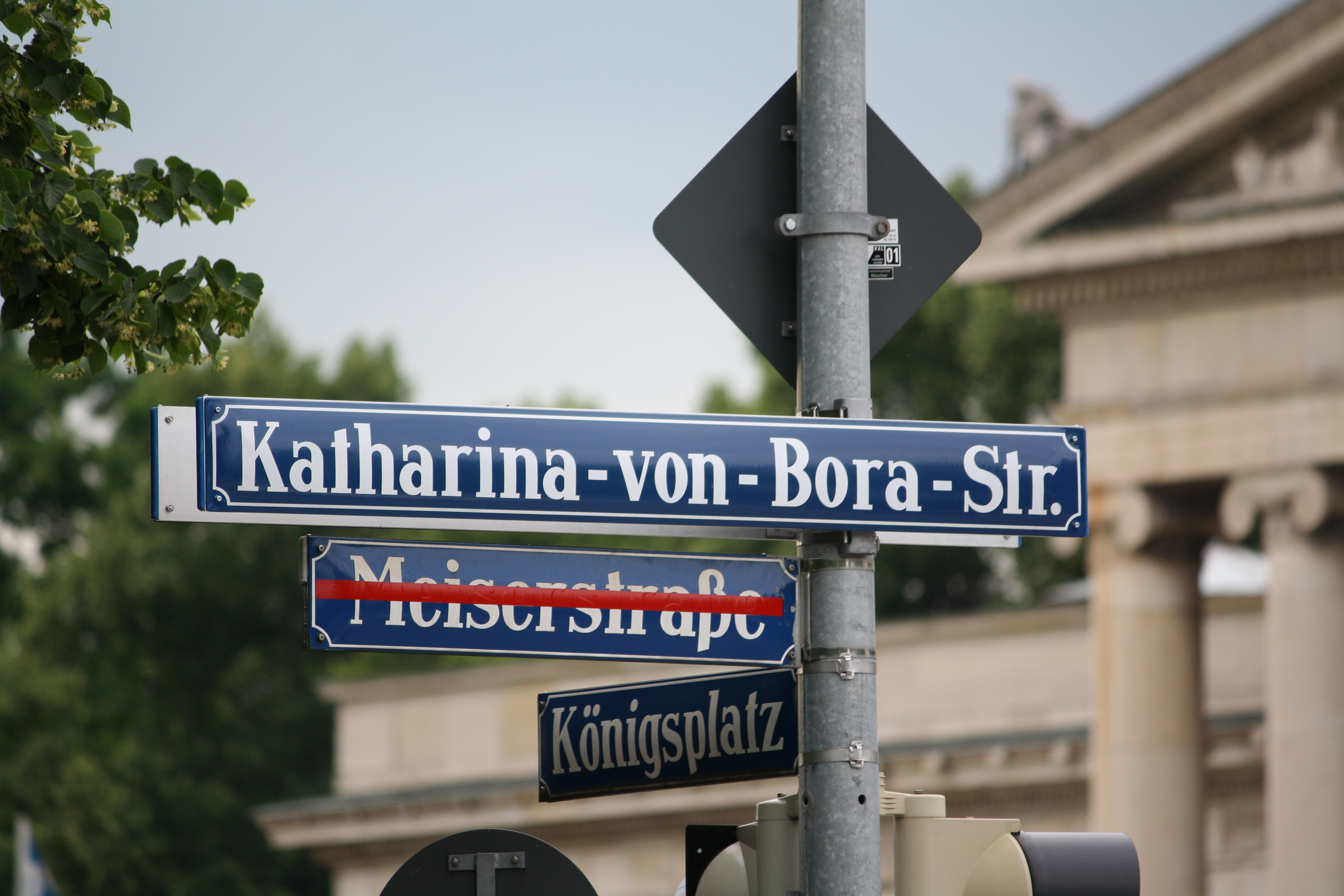 Straßenschild Katharina-von-Bora-Straße (ehemals Meiserstraße) in München nach der Umbenennung